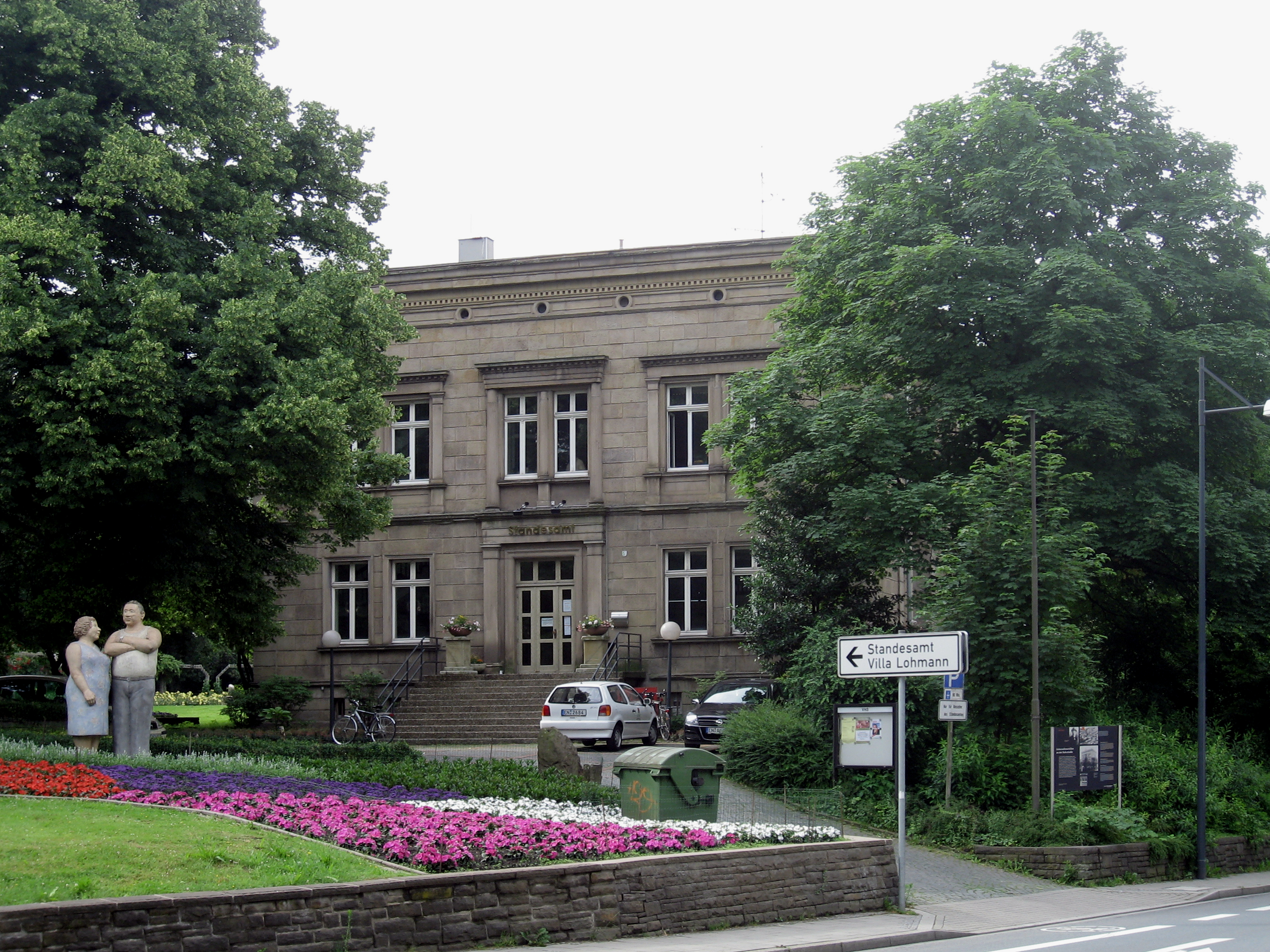 Villa Friedrich Lohmann senior, Ruhrstraße 91 in Witten Lage: Park des von der Familie Lohmann als Fabrik und Wohnhaus genutzten Hauses Witten, 1803-1848 Besitz Carl Lohmanns, nach dessen Tod 1810-1893 im Besitz des Neffen Friedrich Lohmann sen. Im 2. Weltkrieg zerstört, 1962 reduziert wieder aufgebaut, heute Standesamt und VHS; im Umfeld Stadtpark mit Erbbegräbnis der Familie Lohmann